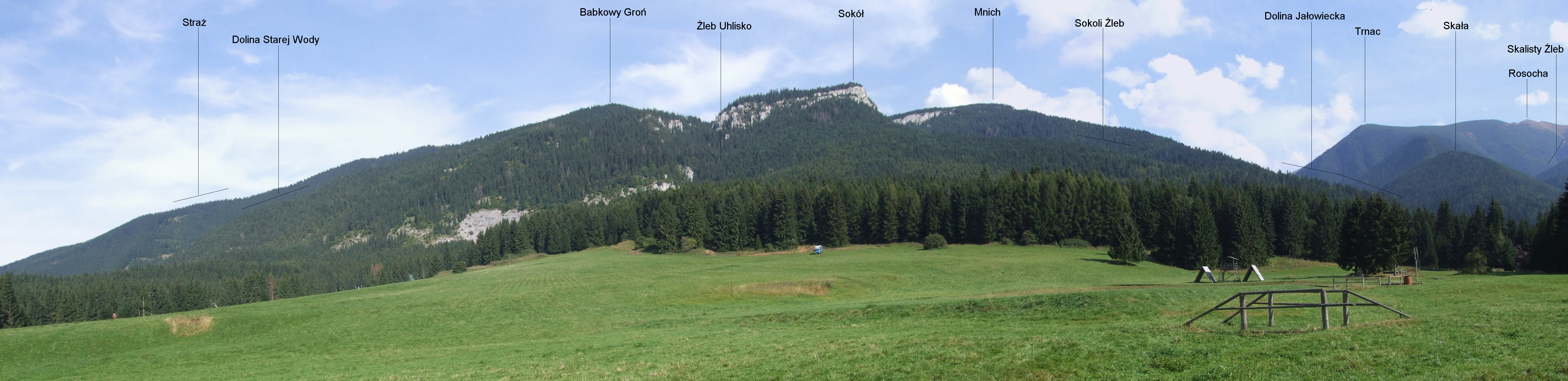 Panorama wylotu Doliny Jałowieckiej